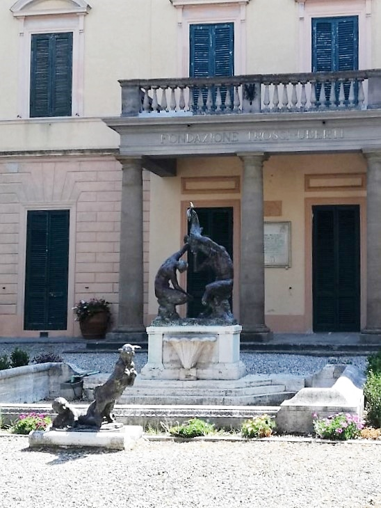 La fontana con gruppo faunesco di Valmore Gemignali all'ingrsso della Villa Trossi Uberti